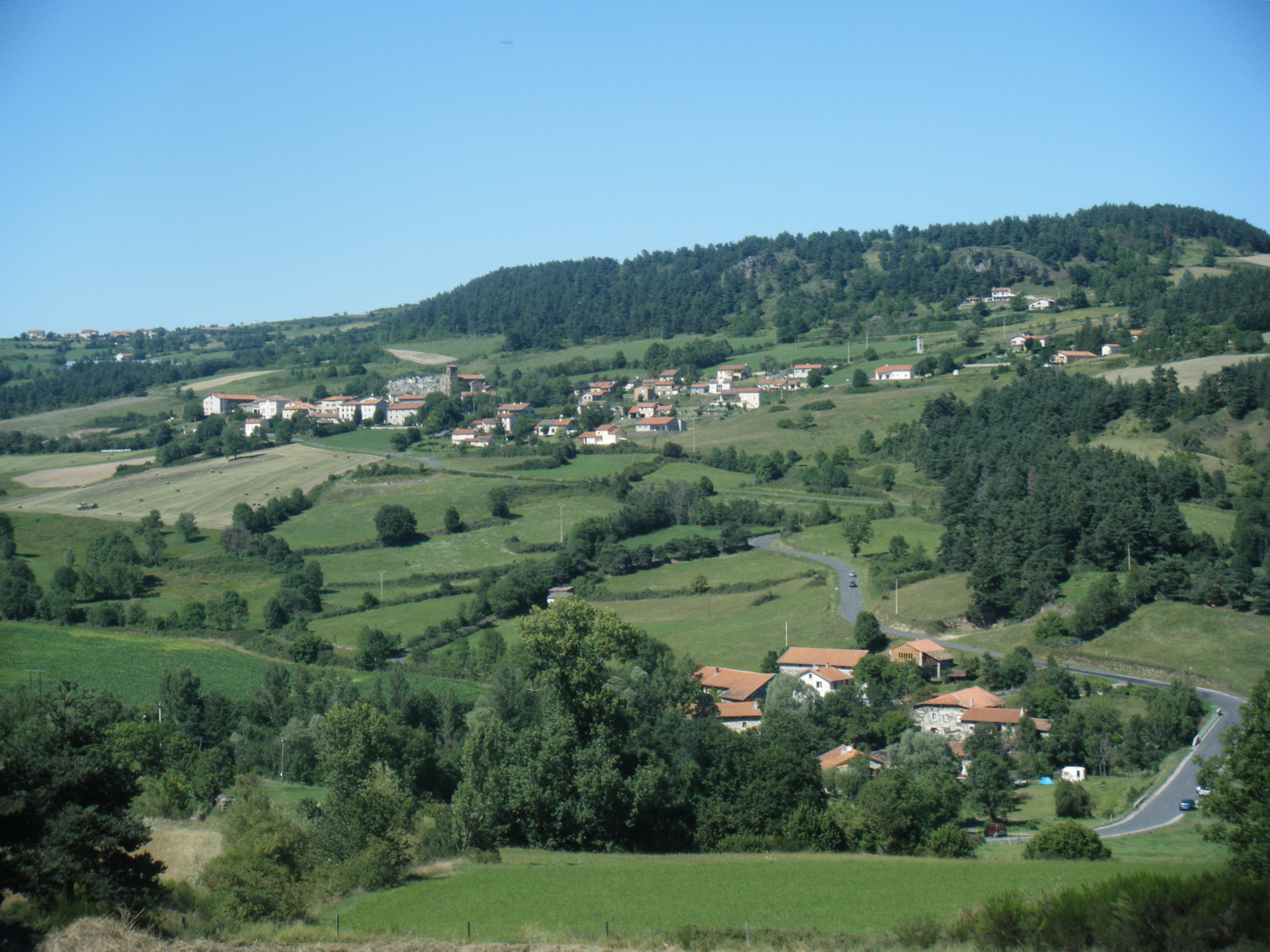 Village de Chadron et Colempce bas